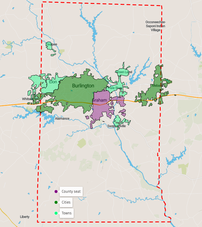 Carte avec localisation des villes